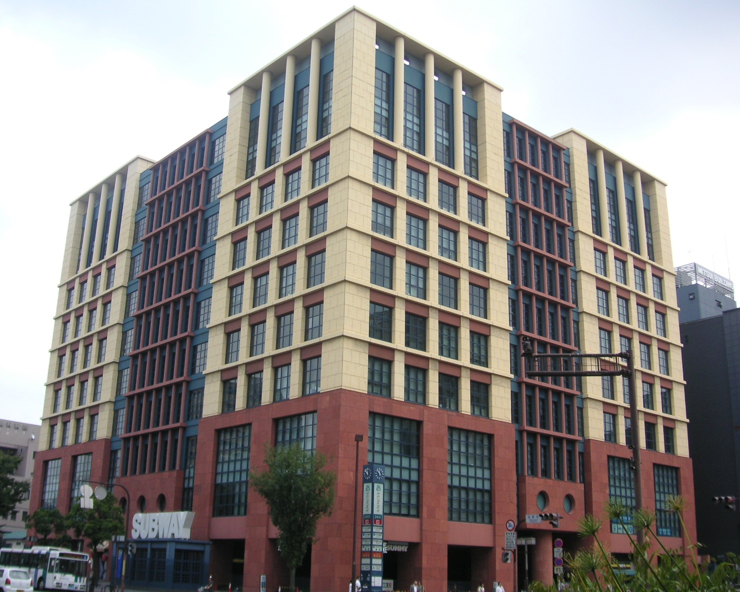 本社の入居する呉服町ビジネスセンター（正面）